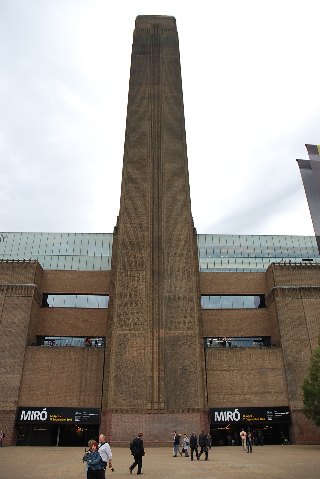 L'ingresso del museo d'arte Tate Modern visto dalla piazza antistante.